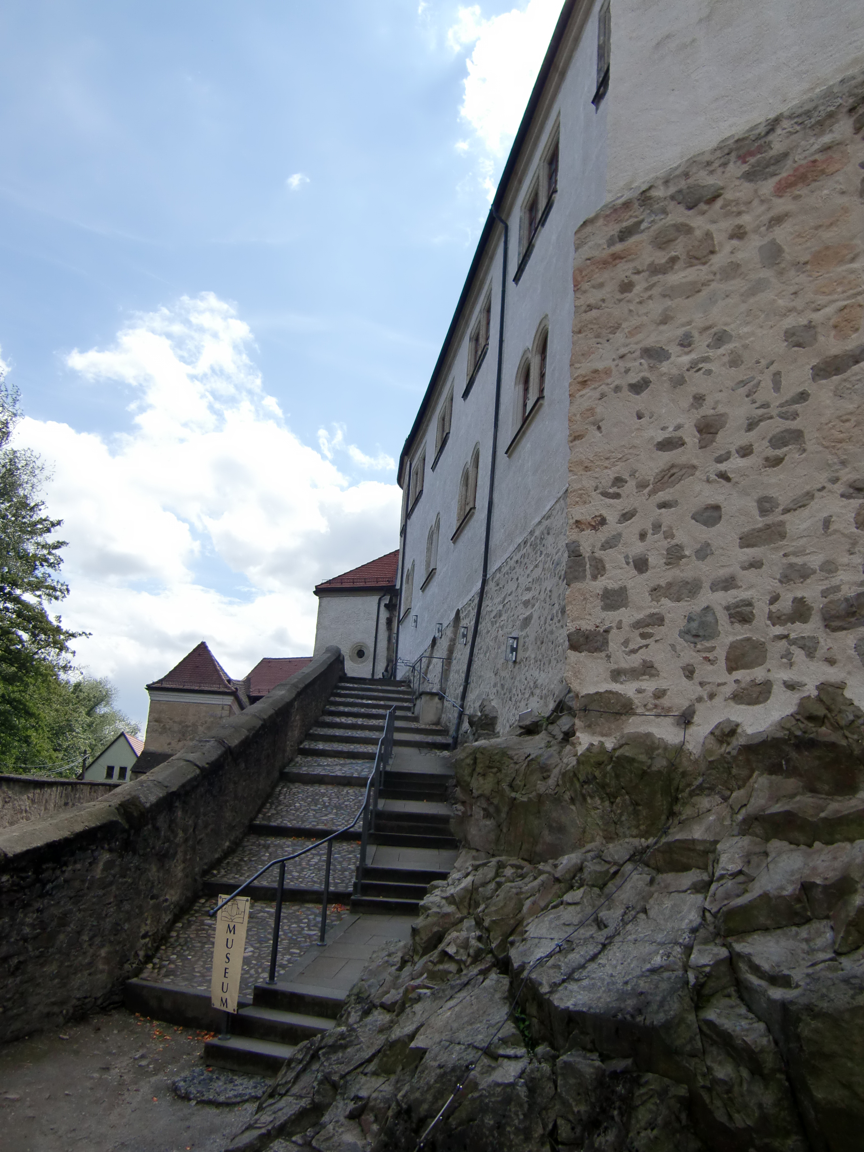 Castle Klippenstein (Radeberg)